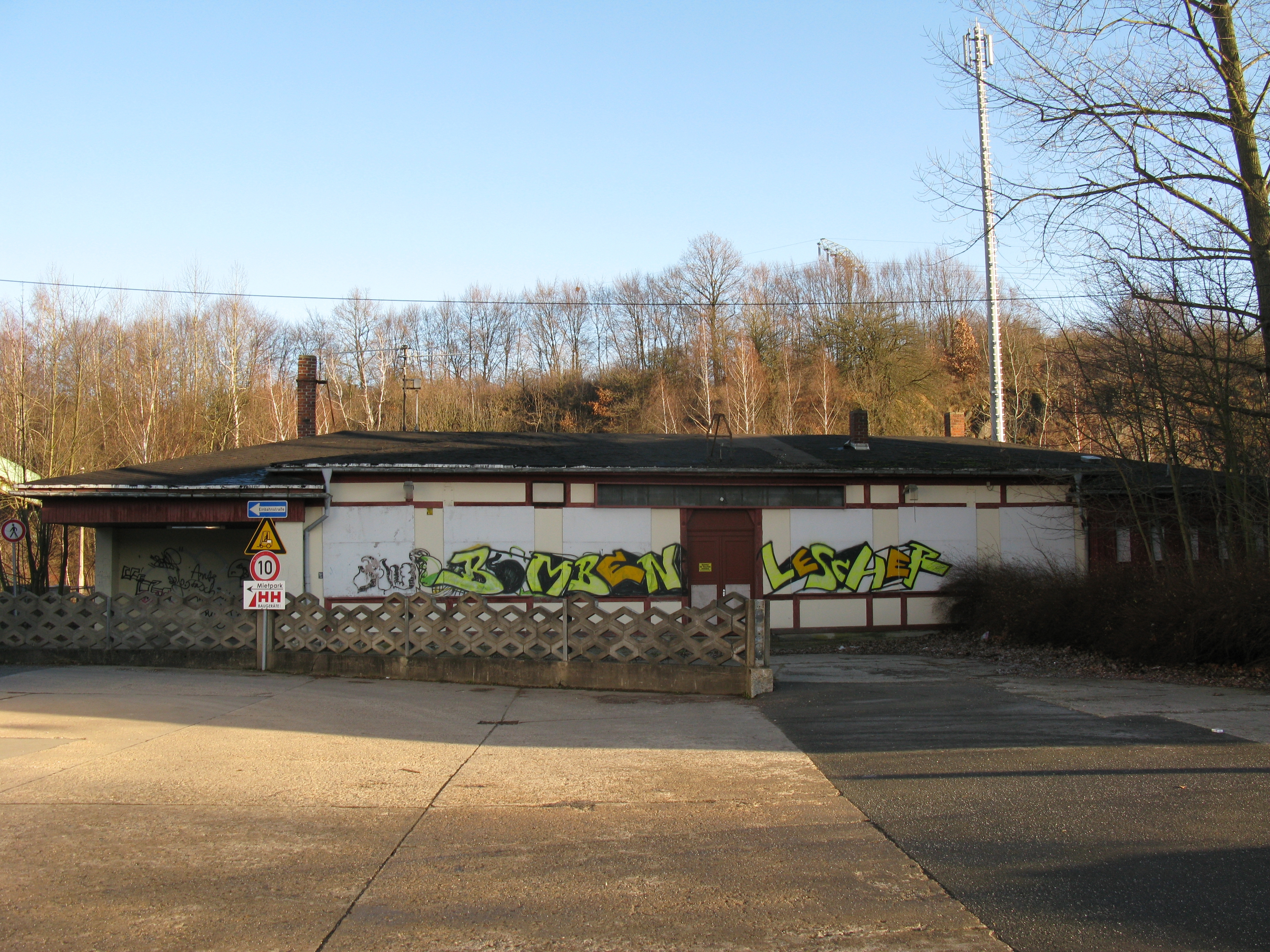 Denkmalgeschütztes Empfangsgebäude des Bahnhofs Chrieschwitz am Hammerplatz (Hammerplatz 7) im Plauener, Stadtteil Chrieschwitz